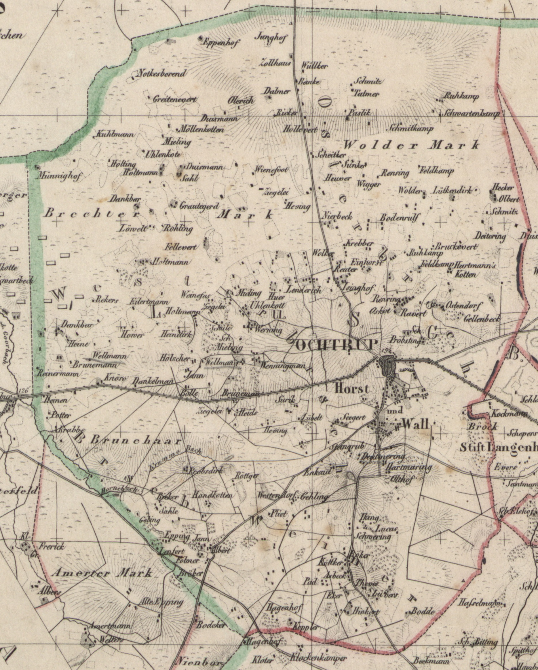 Location of Wigbold and Kirchspiel Ochtrup